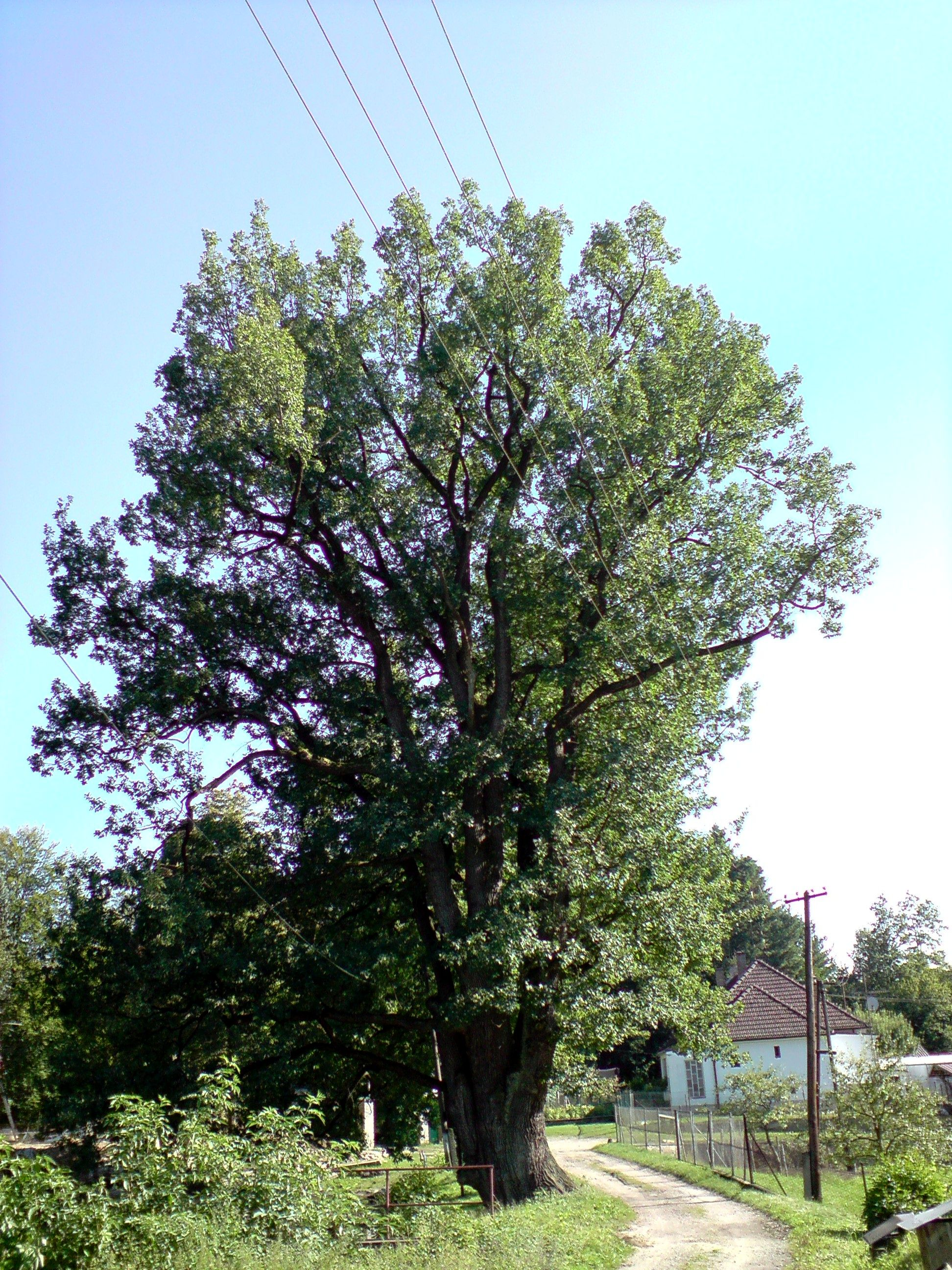 Památný dub roste na hrázi rybníka Zájezek na kraji Chlumu u Třeboně.